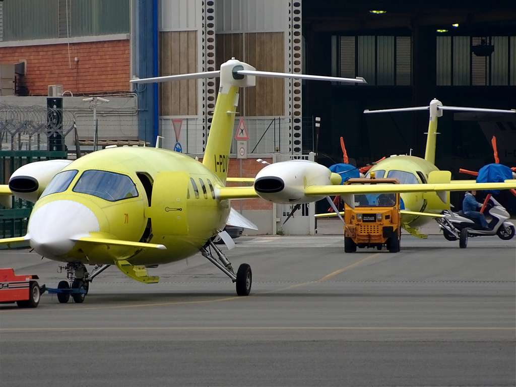 I-PDVO (cn 1189) A P-180 with temporary registration I-PDVO ,is towed to apron for test operation.Another P-180 in the background for same operation.